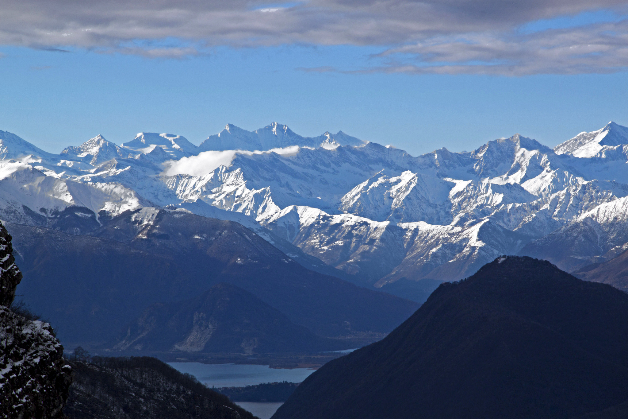 Parco naturale dell'Alta Valle Antrona (Q3895641)